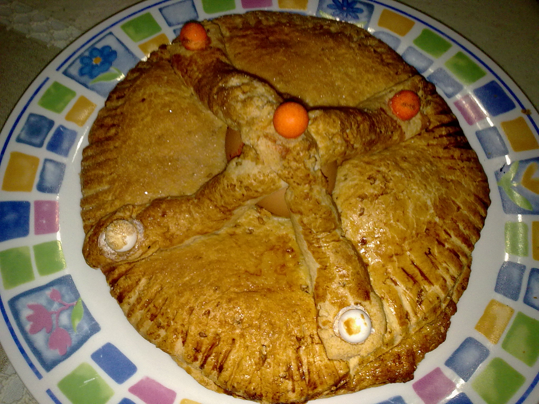 Hornazo. Dulce típico de la festividad de Jueves Lardero en la localidad cordobesa de Fernán Núñez.